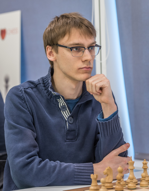 Erik Blomqvist stormästare i schack. Foto: Lars OA Hedlund